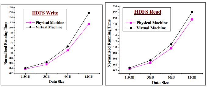 Cluster physique vs cluster machine virtuelle